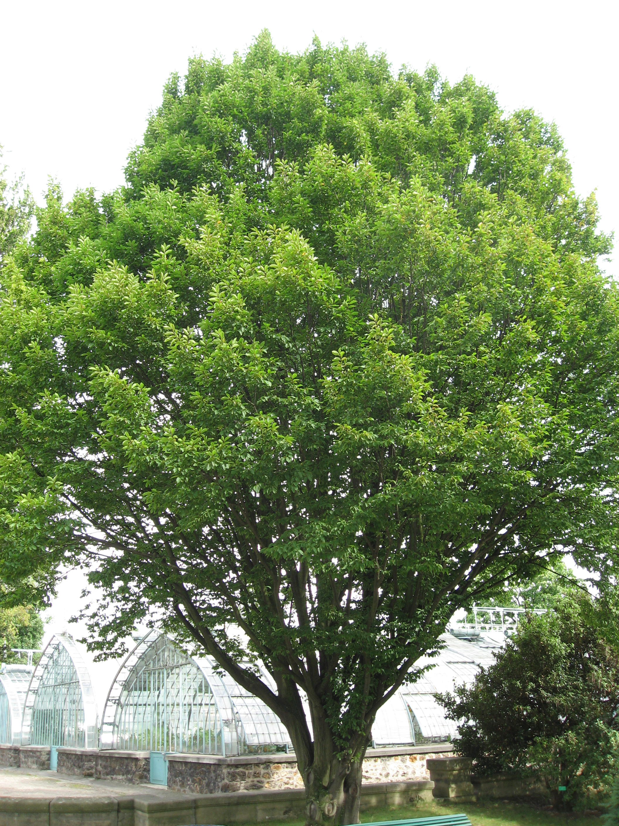 Carpinus betulus in Serres d'Auteuil Map: 48° 50' 49" N 2° 15' 8" E